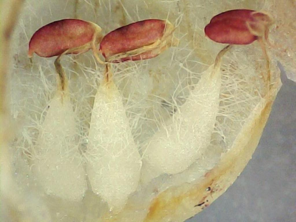 Arbutus unedo (Madroño) - Estambres, detalle. (se ha abierto la corola) - Calle Goya, cultivado/ornamental (Madrid, España)